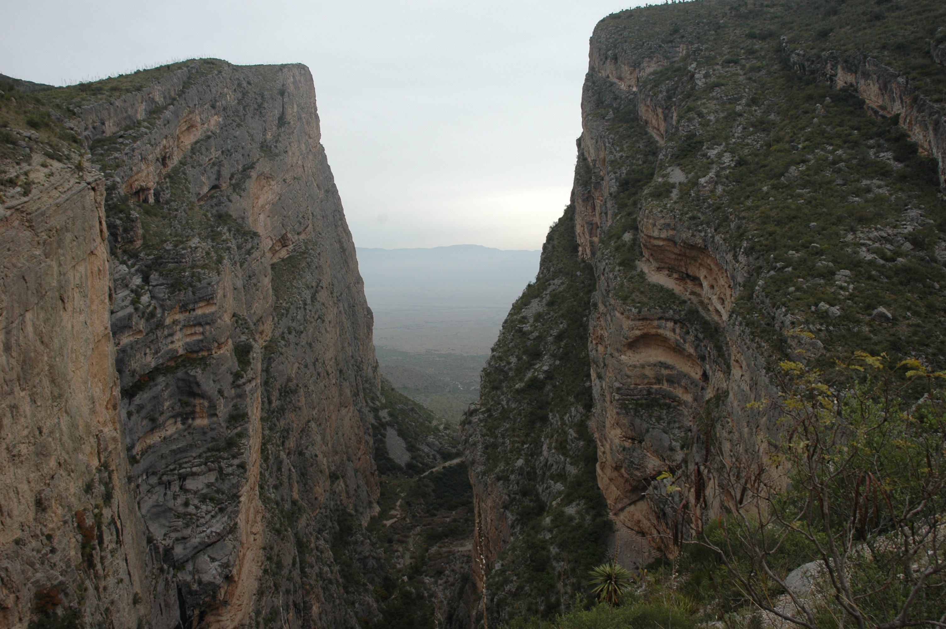 Maderas del Carmen, Coahuila